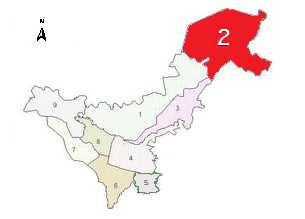 Comuna 2 Popayán